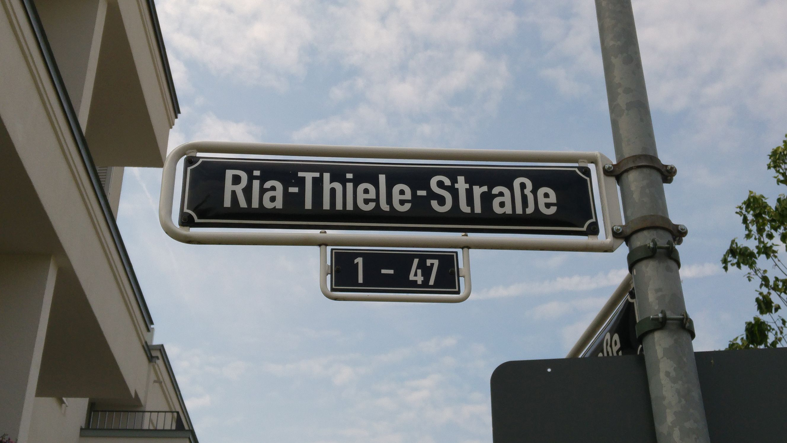 Straßenschild der Ria-Thiele-Straße in Düsseldorf-Oberkassel